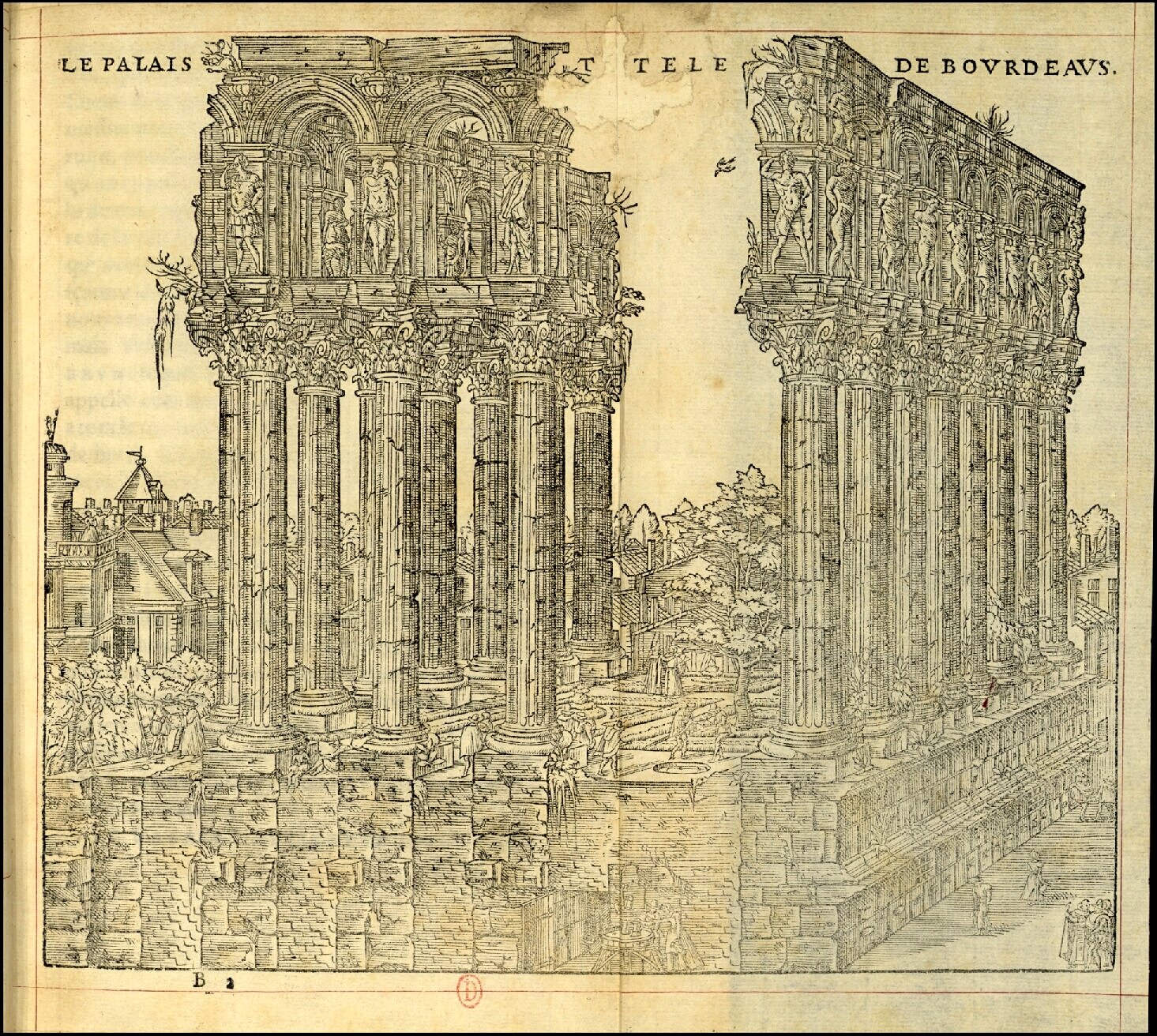 Vinet Antiqvité de Bordeavs palais de Tutelle (1574)